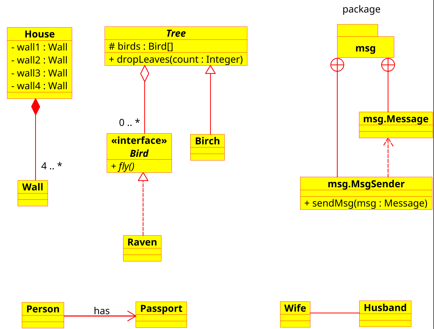 отношения на диаграмме классов